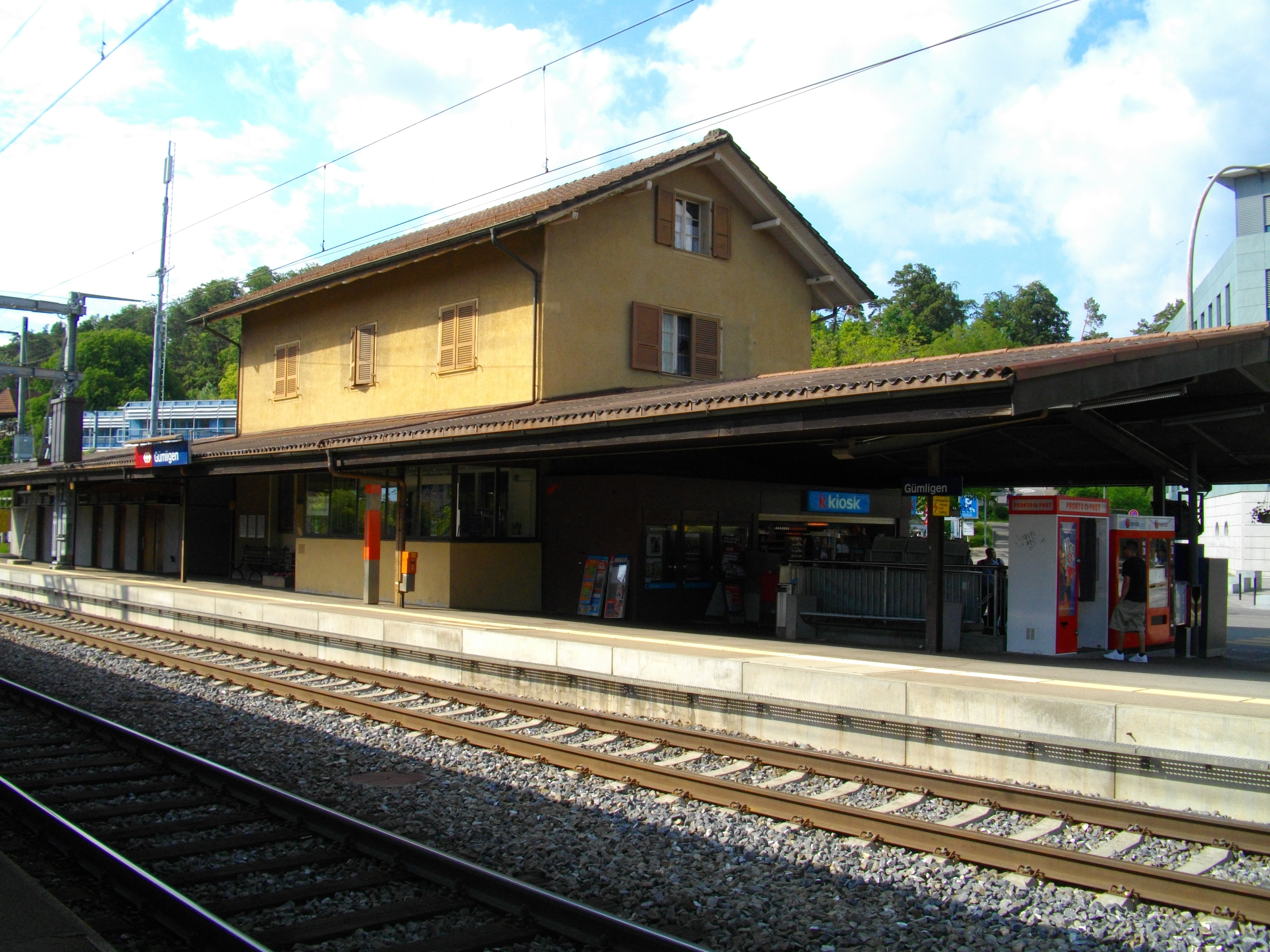 Estación de tren en Gümligen